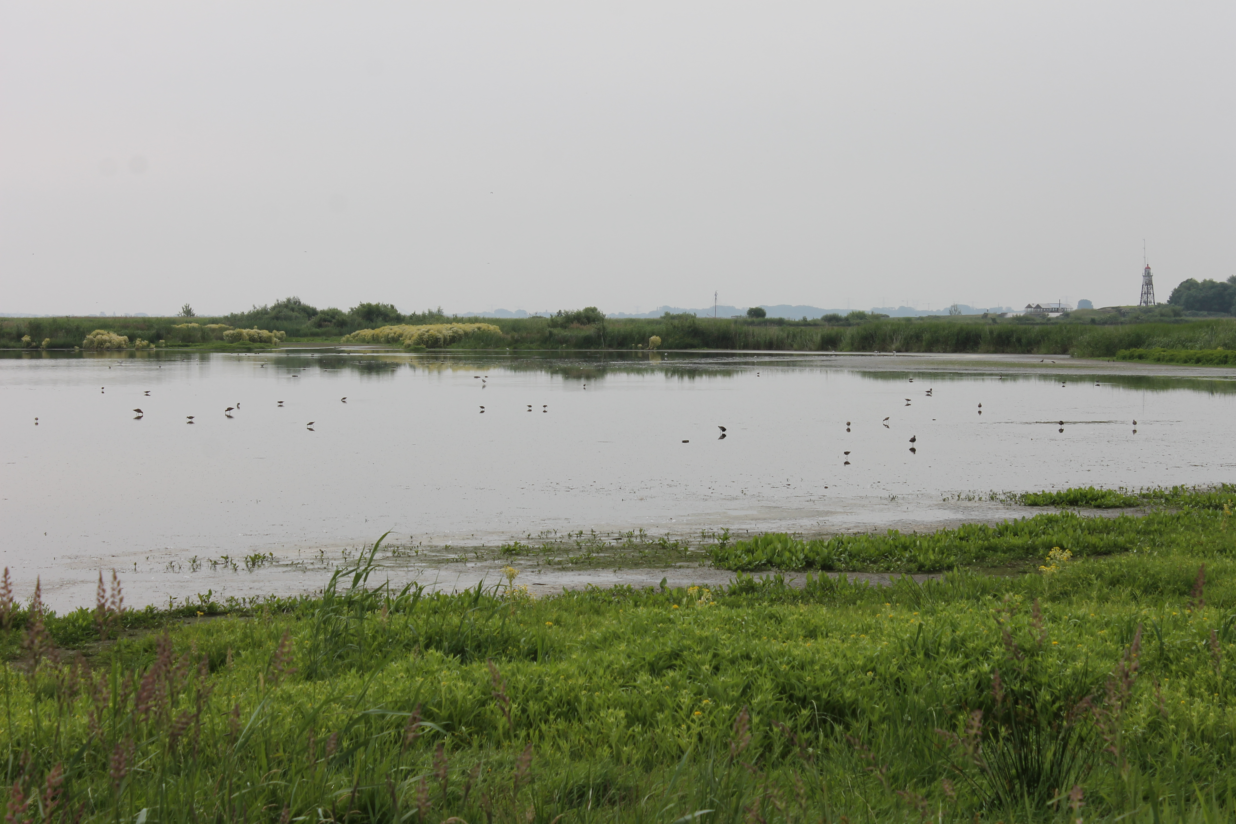 Fouragerende vogels in een ondiepe plas in de polder IJdoorn. Achtergrond rechts: bebouwing op het Vuurtoreneiland. Foto genomen vanaf het vogelkijkpunt.